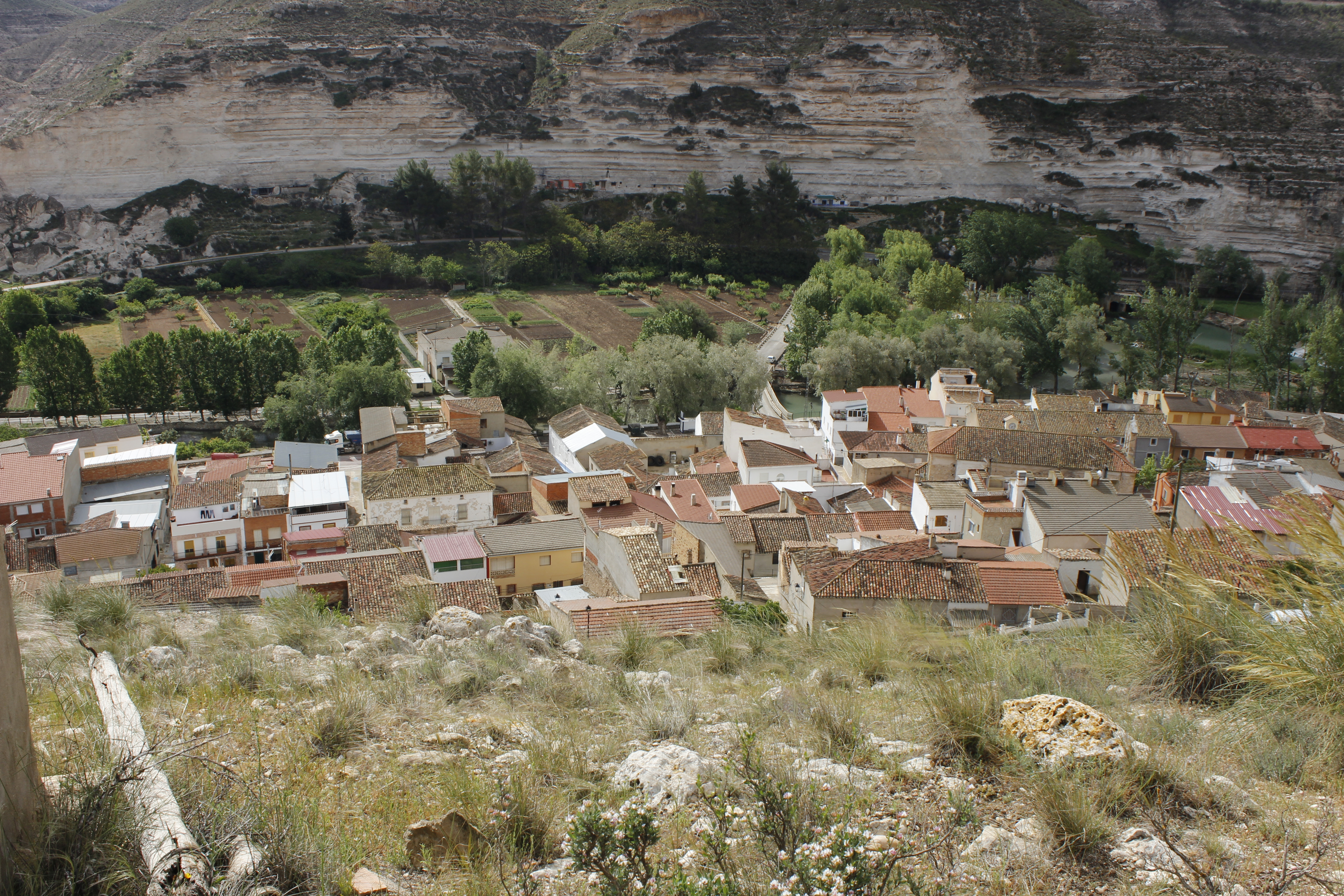 Vistas desde el Repetidor de telecomunicaciones